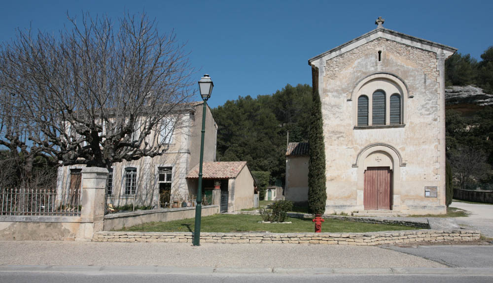 Village of les Beaumettes, Vaucluse, France